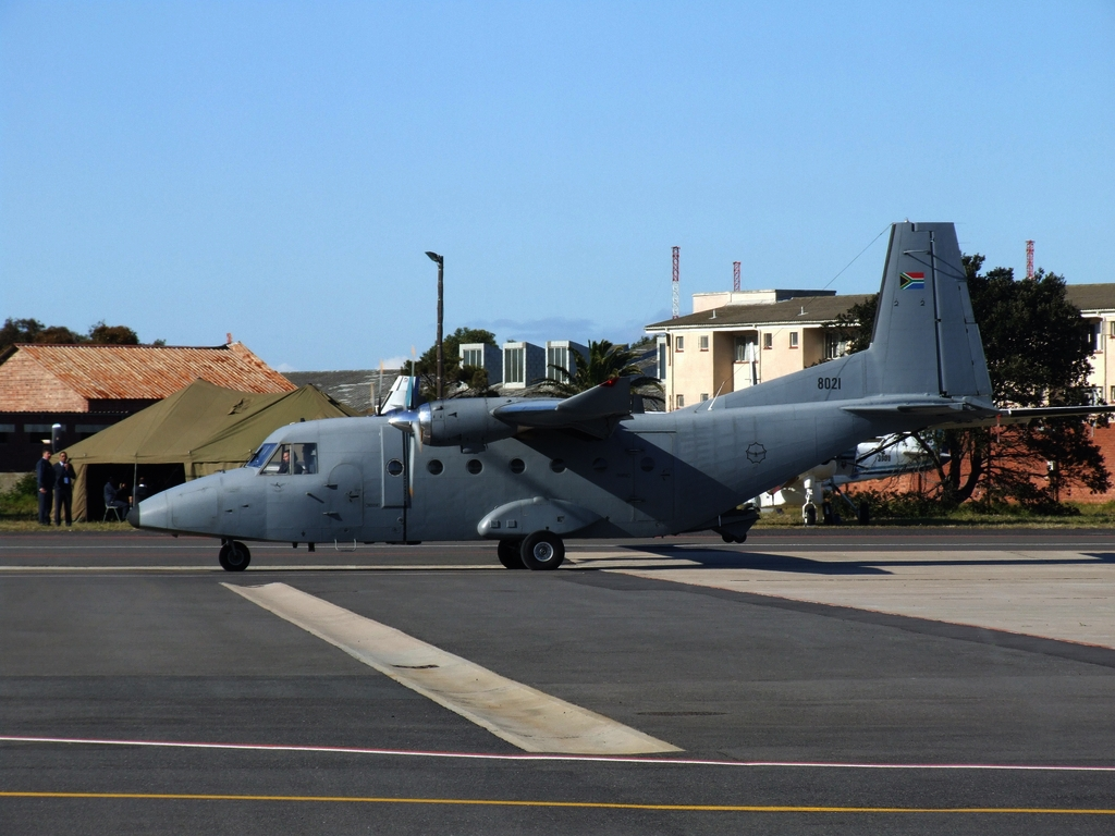 SAAF CASA 212-300 8021